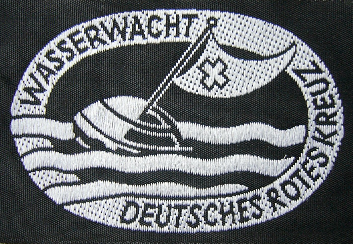 Rettungsschwimmerabzeichen des Deutschen Roten Kreuzes in Silber